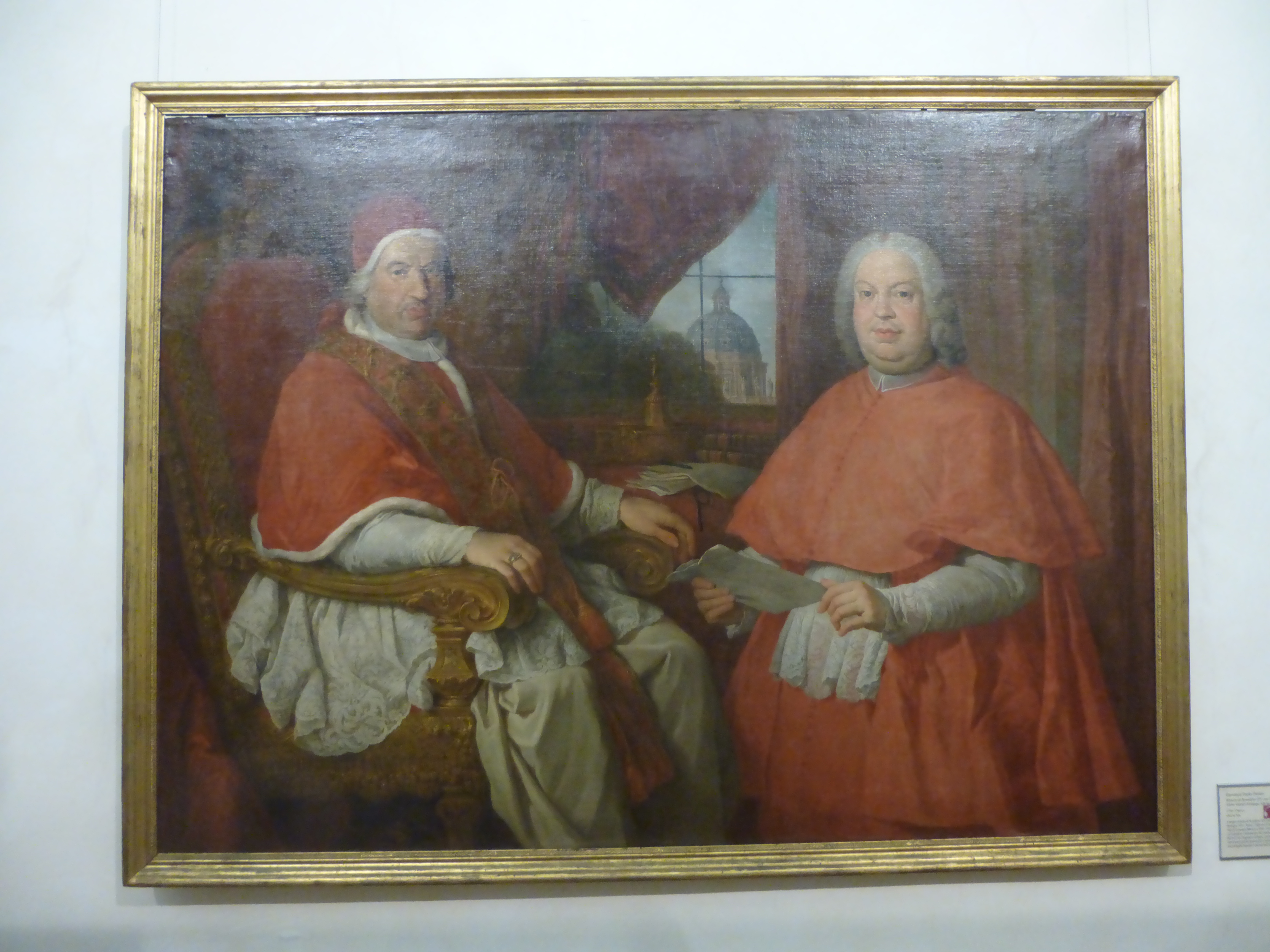 Museo di Roma a Palazzo Braschi. Ritratto di Benedetto XIV Lambertini con il card. Silvio Valenti Gonzaga (G.P. Panini, 1750-1760)